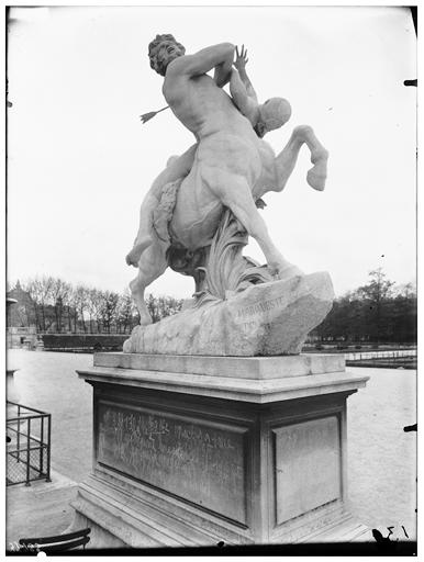 Statue du centaure Nessus enlevant Déjanire